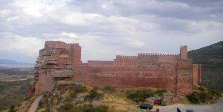 Castillo de Peracense, Aragona, Spain